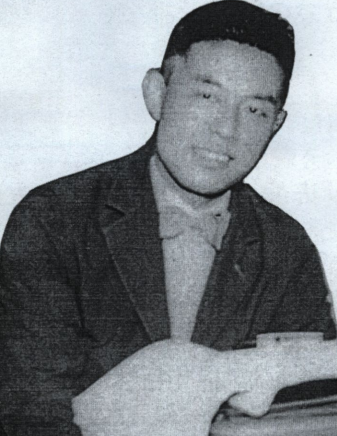 新国劇時代の斎藤三郎